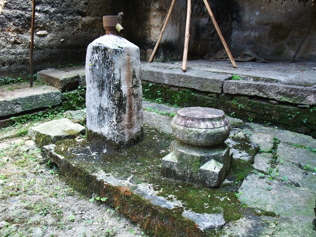 东源康禾仙坑村八角楼20121003